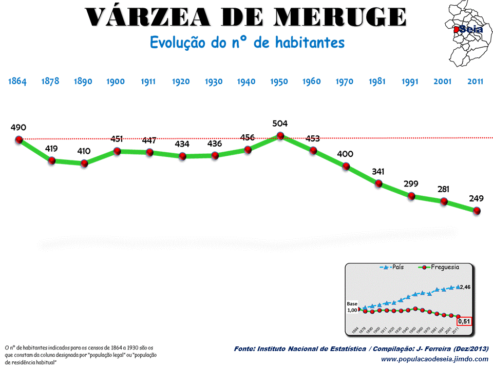 Evolução da População 1864 / 2011